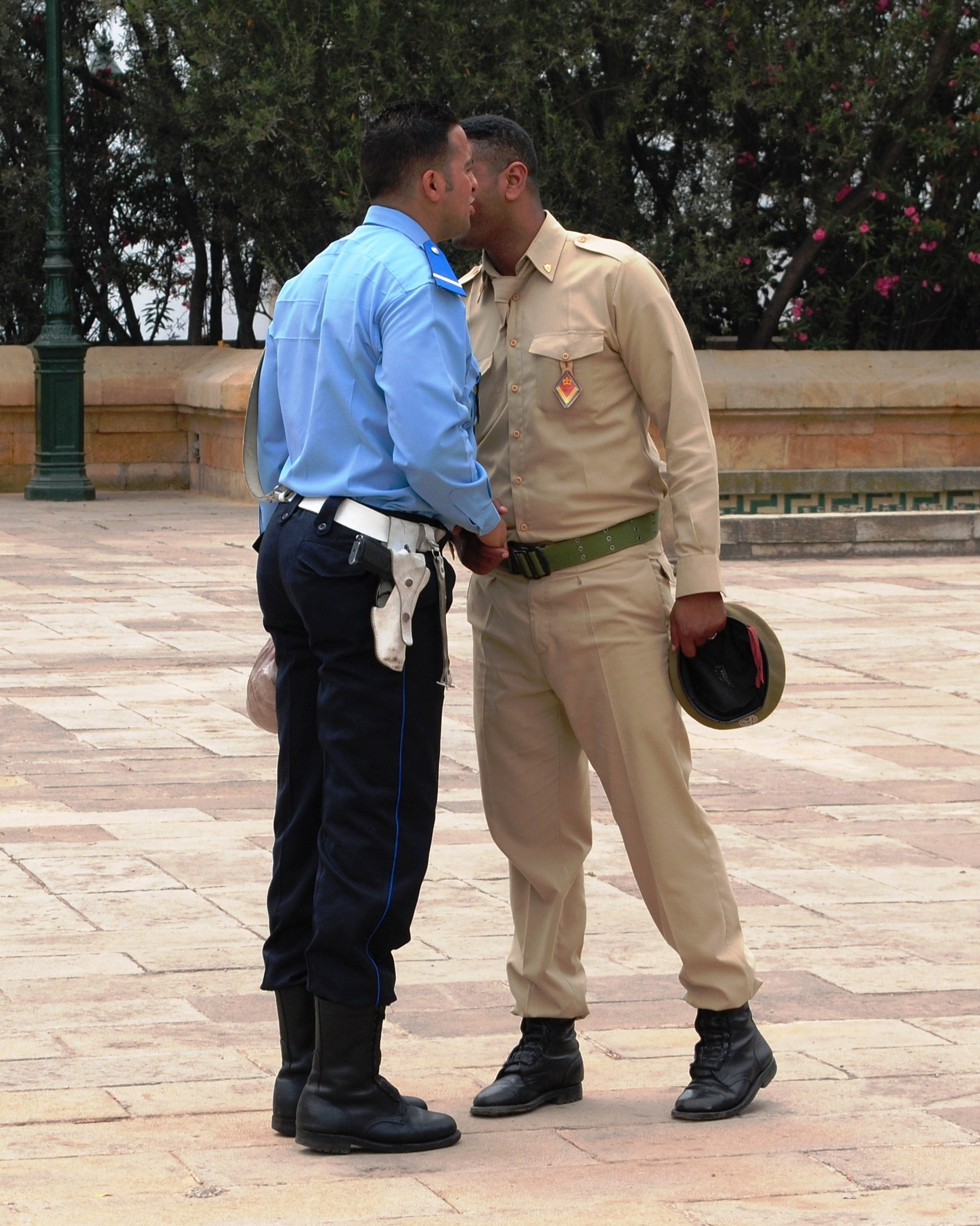 Baiser, Casablanca, 2010